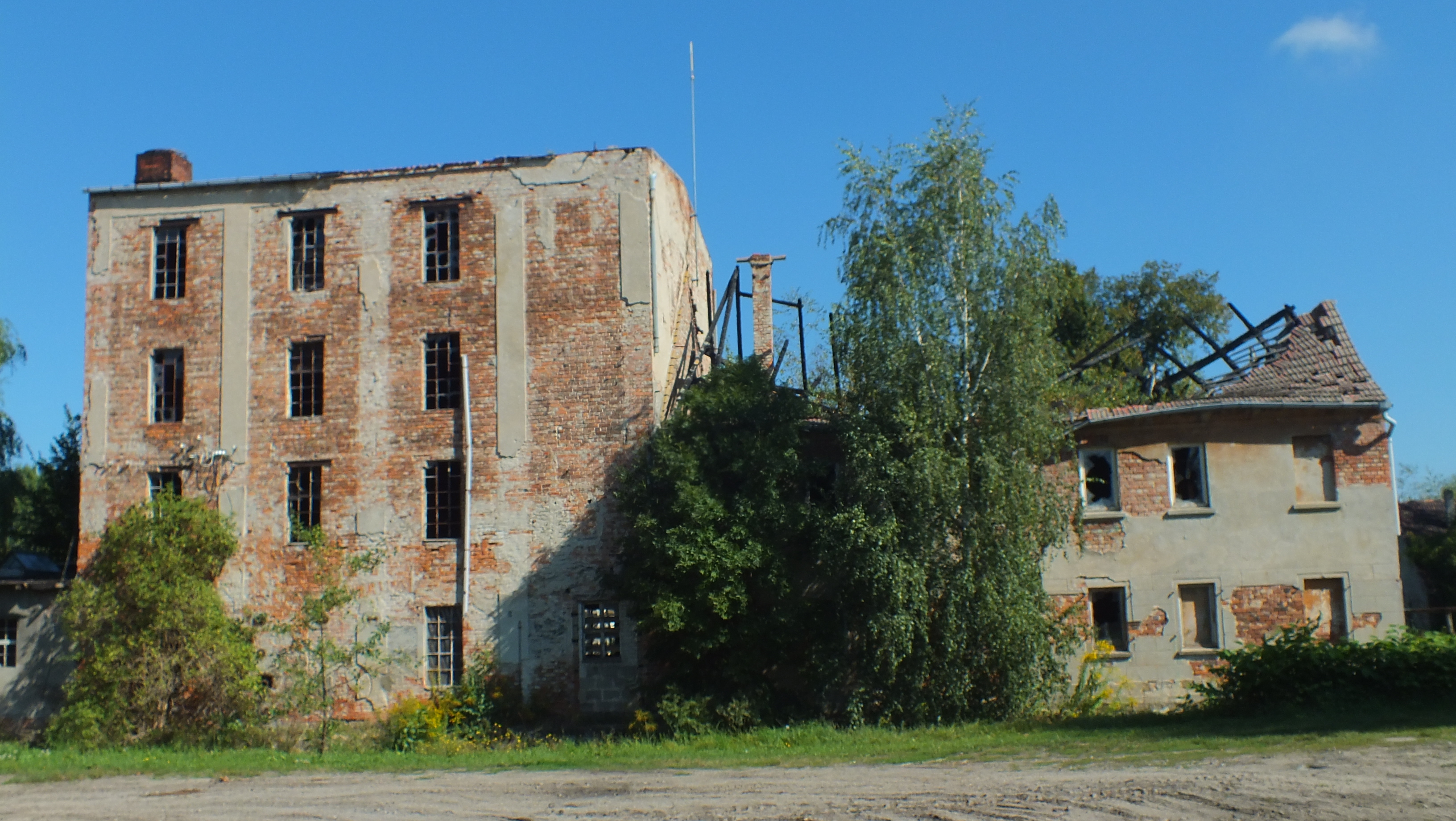 ehemalige Stadtmühle in Annaburg